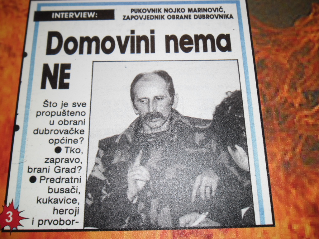 prizor iz dubrovačkog Muzeja Domovinskog rata na Srđu